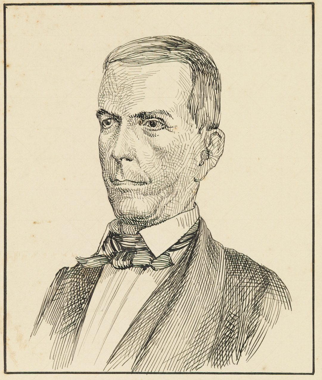 Retrato de Francisco Muniz Barreto, extraído de FREIRE, Laudelino (Org.). Desenhos dos sonetos 1 a 51: 1623-1833. Rio de Janeiro: F. Briguiet & Cª, [189-?].